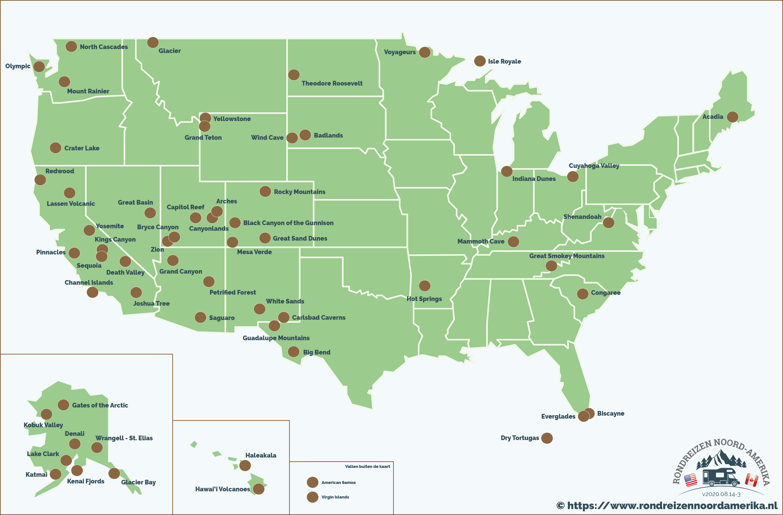 Nationale Parken van de Verenigde Staten op kaart.